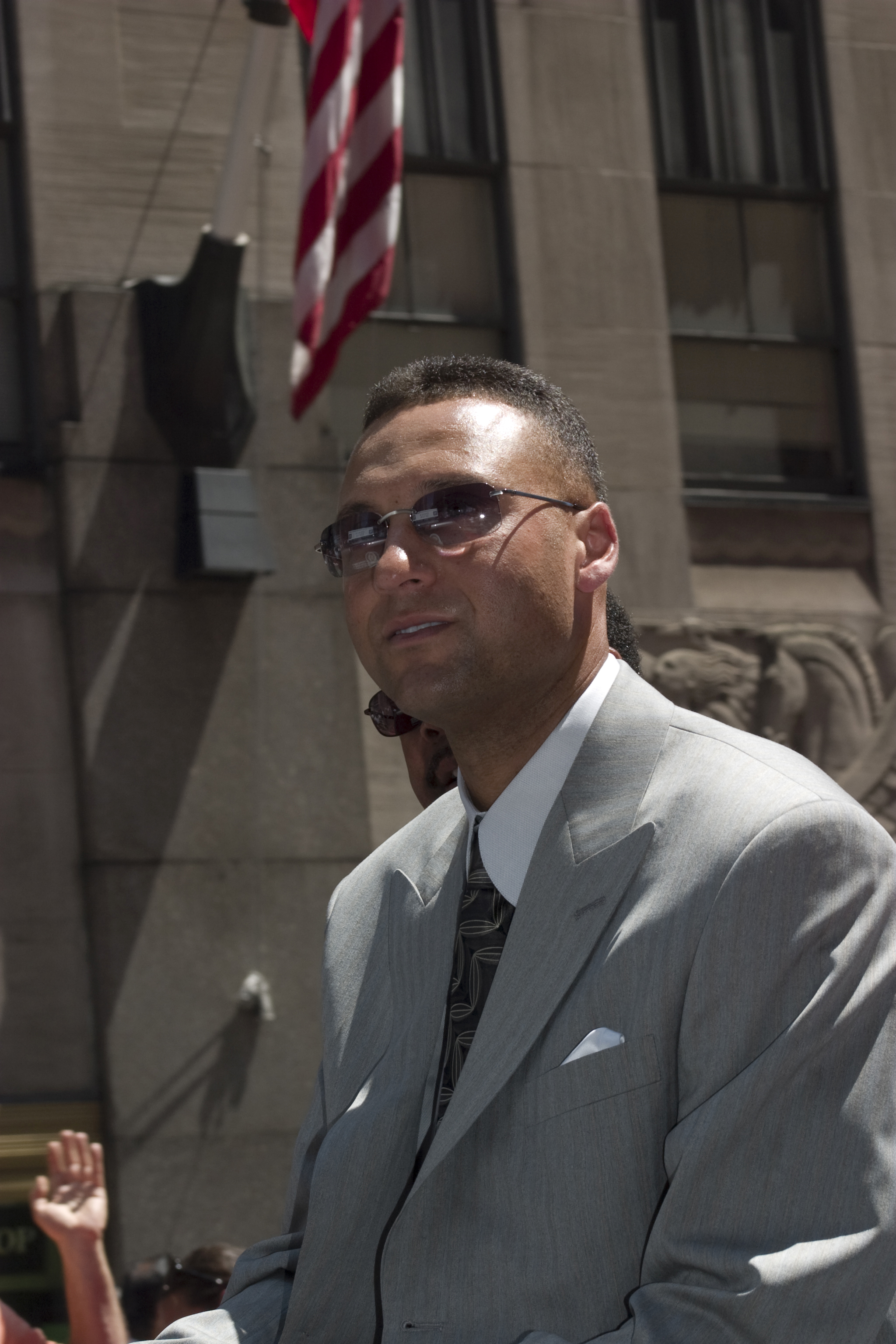 © Rubenstein, photographer Martyna Borkowski